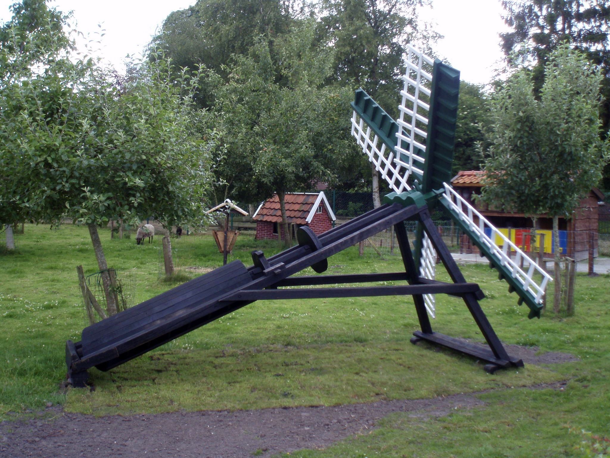 Rekonstruktion eine Fluttermühle, wie sie früher in Ostfriesland zum entwässern tiefer gelegener Gebiete genutzt wurde. Das Foto wurde aufgenommen im Dorfmuseum Münkeboe